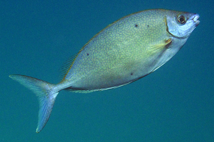 Siganus argenteus, en isla Lizard, Gran Barrera de Arrecifes, Australia